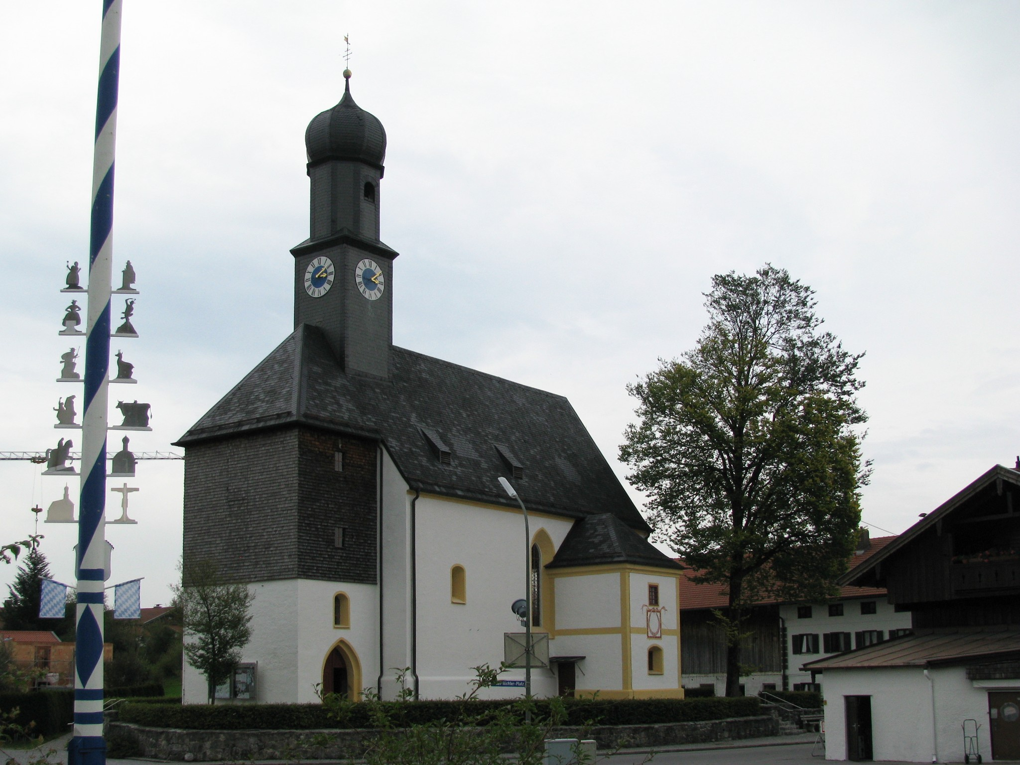 Heilig-Kreuz-Kirche in Schaftlach; Ansicht von Südwesten